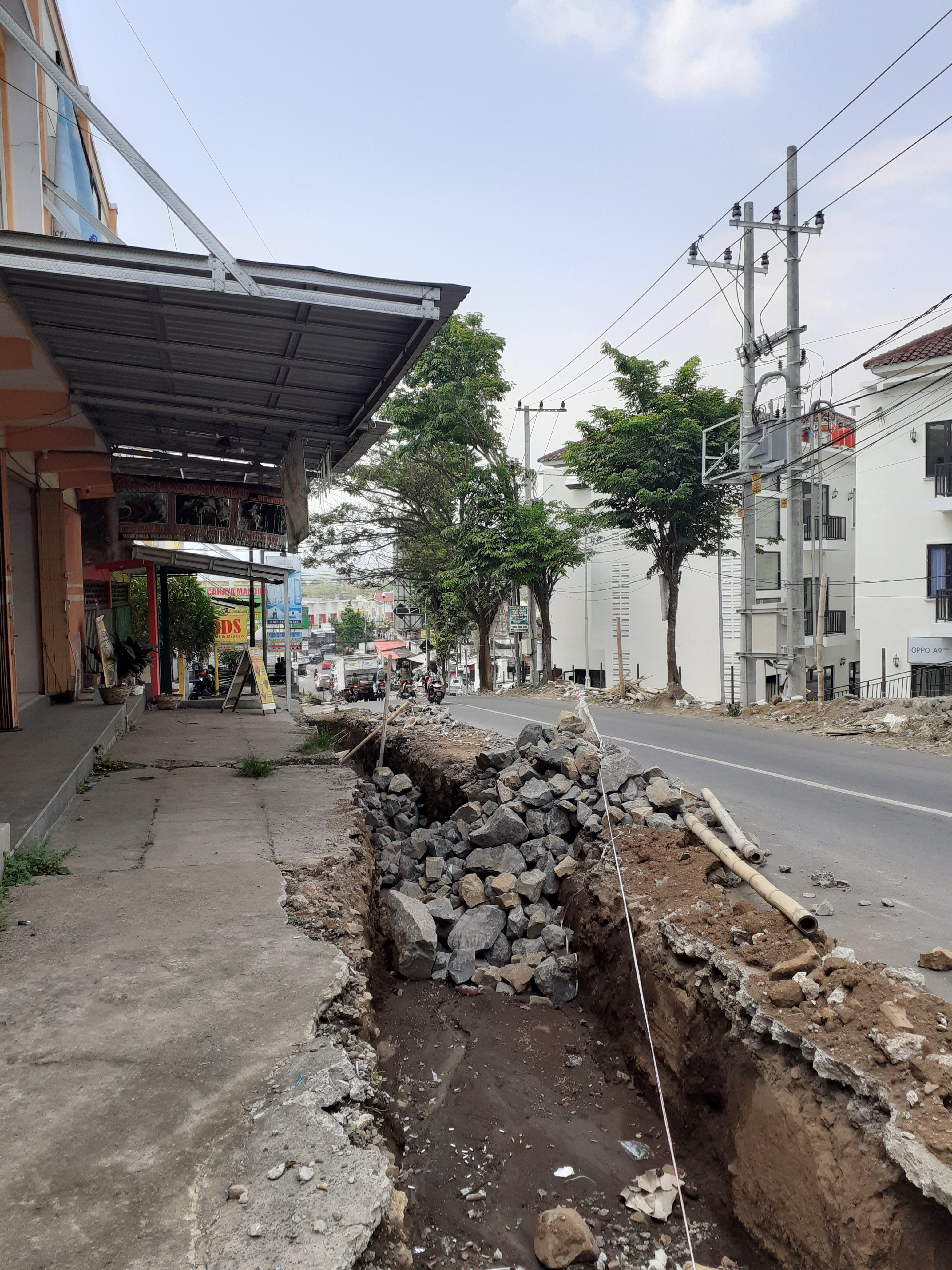 Proses konstruksi selokan di tepi Jl. Tidar, Sumbersari, Jember